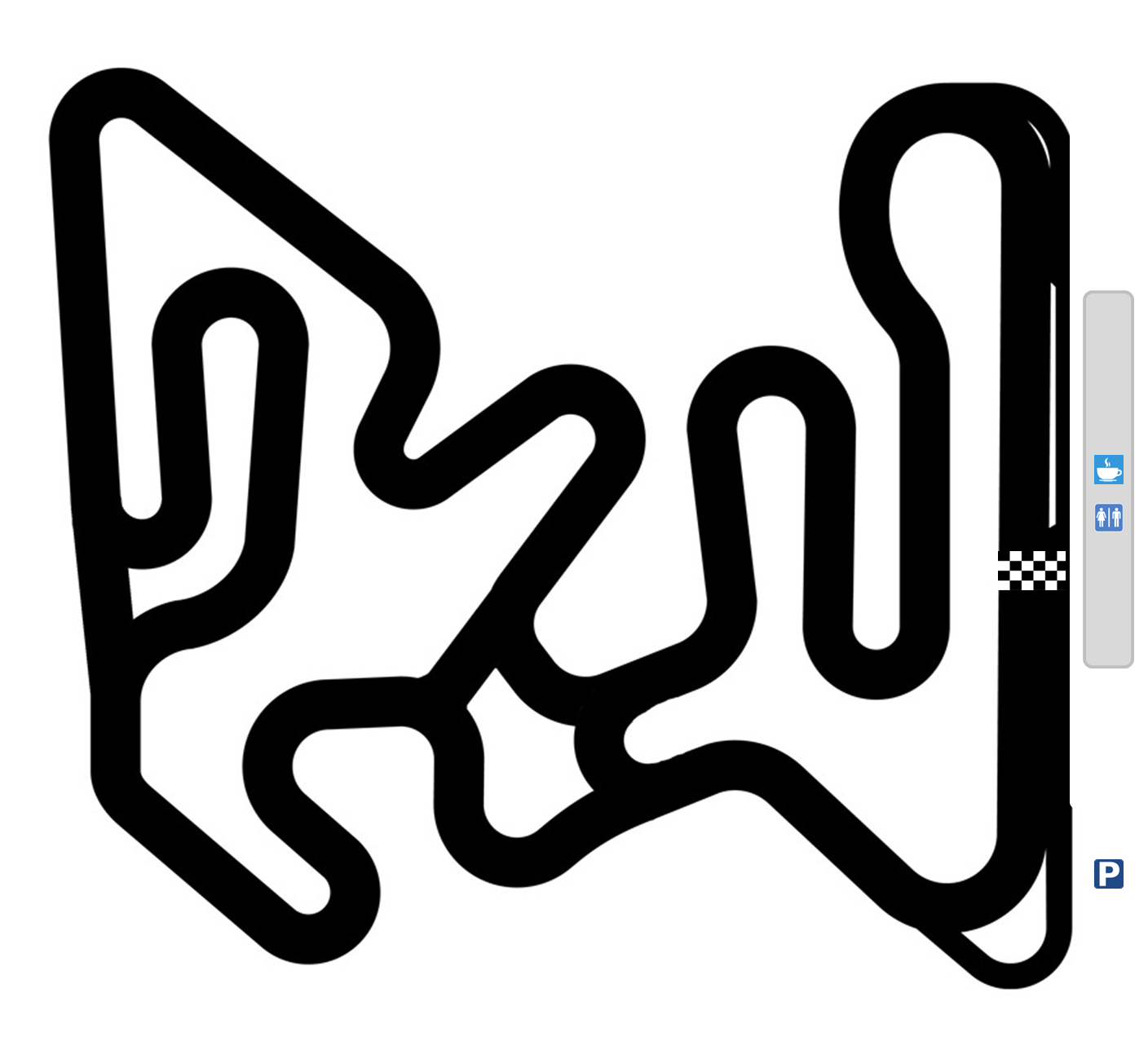 Trazado del Circuito Dani Rivas.